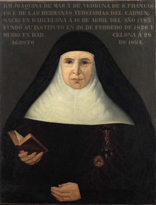 Santa Joaquima de Vedruna anciana. Retrat pintat a finals del segle XIX per una néta de la santa, a partir d'una fotografia original.